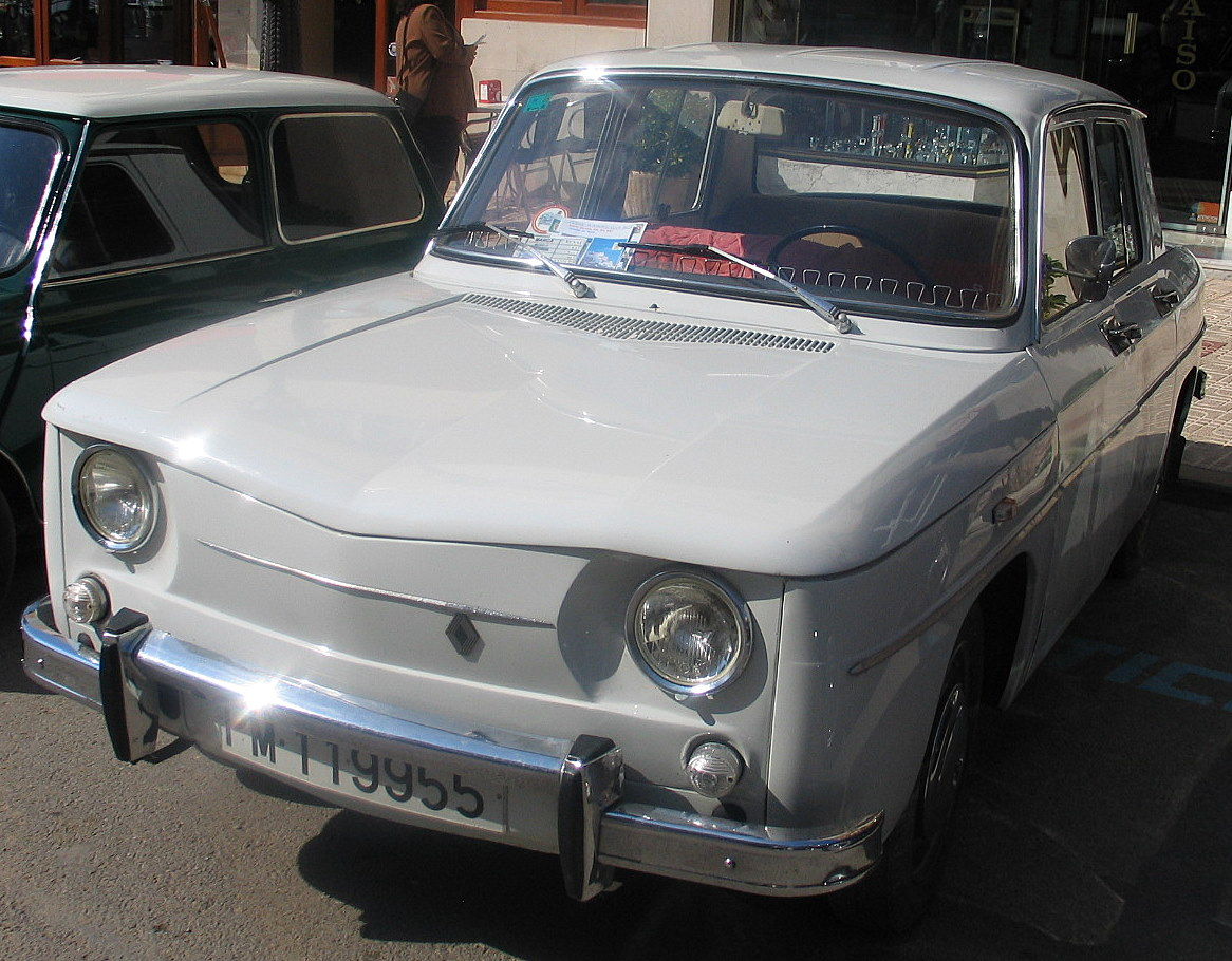 Renault R8